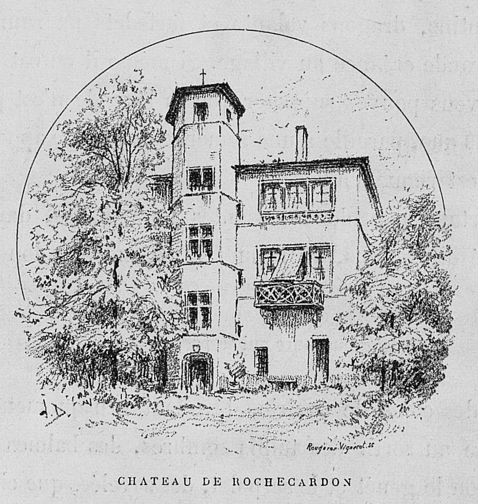 Aux environs de Lyon / Monsieur Josse ; préface de M. Coste-Labaume ; édition illustrée de 250 dessins de J. Drevet.